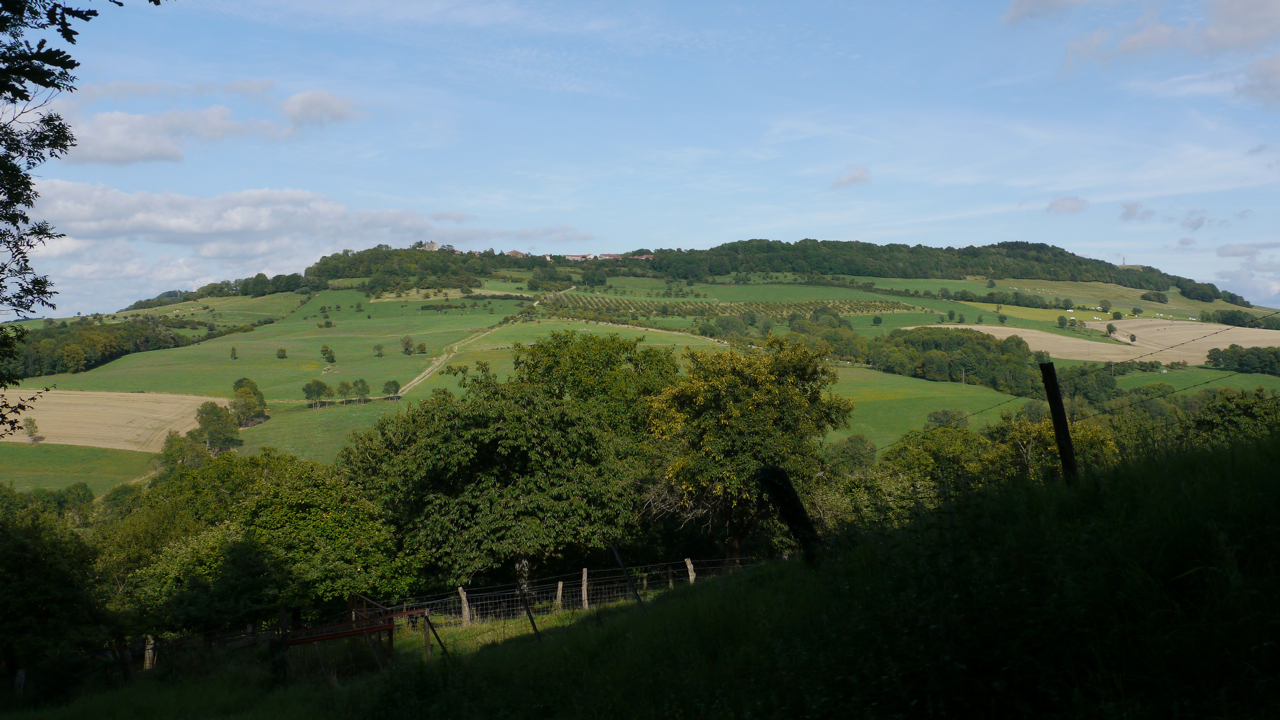 La Colline de Sion vue du Sud-Ouest : - en arrière plan à gauche la flèche de la Basilique (à 4km) - au centre de la moitié gauche, la Tour Brunehaut (à 1500m) - à droite, le monument Barrès (à 2500m)